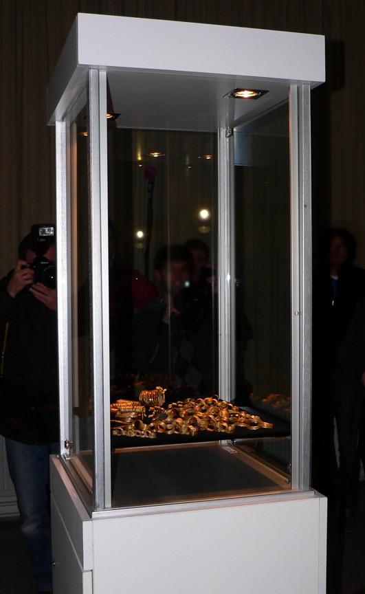 Präsentation des Goldhort von Gessel in Schaukasten, präsentiert bei Pressekonferenz, Goldhort von Gessel, fotografiert im Niedersächsischen Landesamt für Denkmalpflege